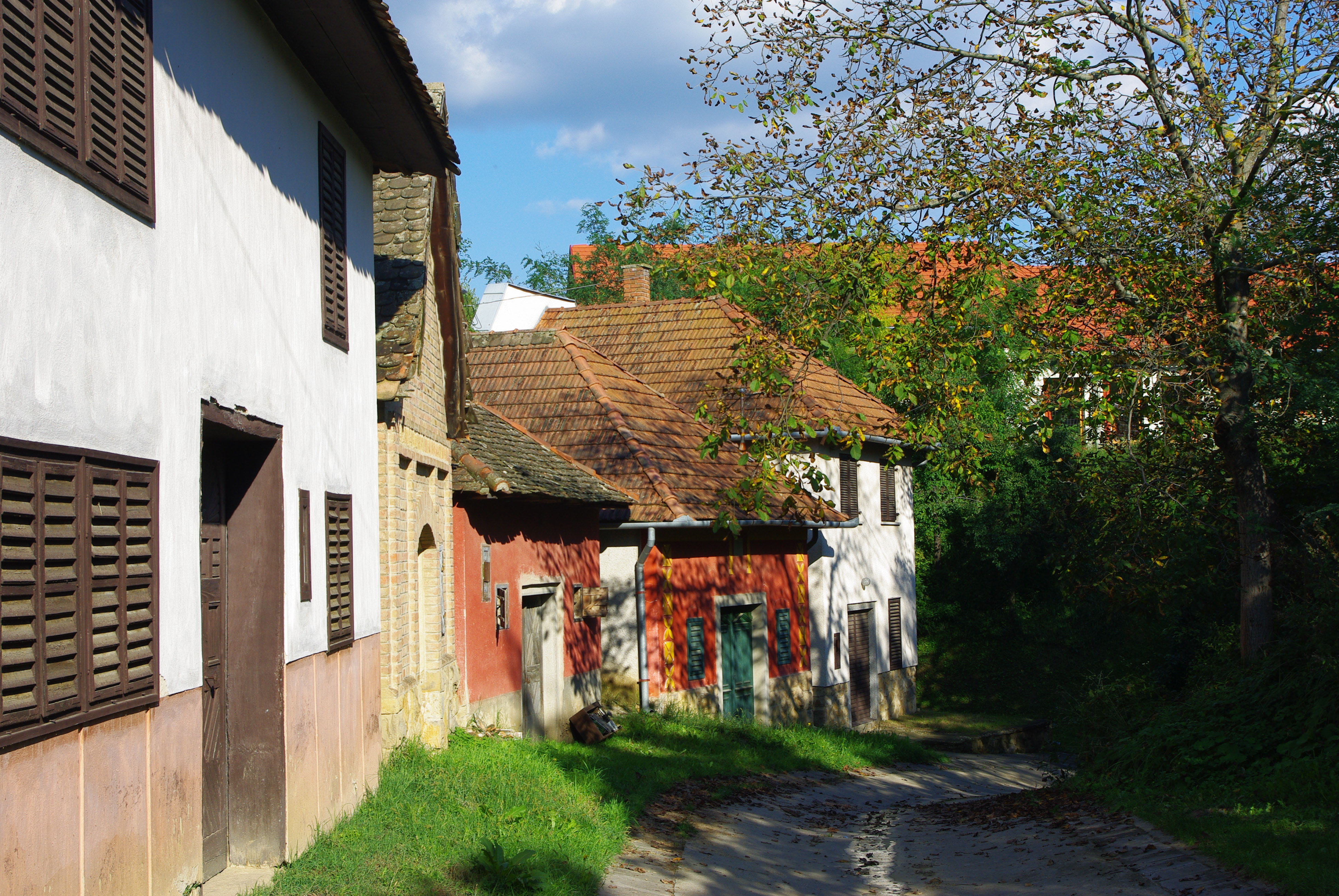 Mecseknádasdi pincesor Linksholban